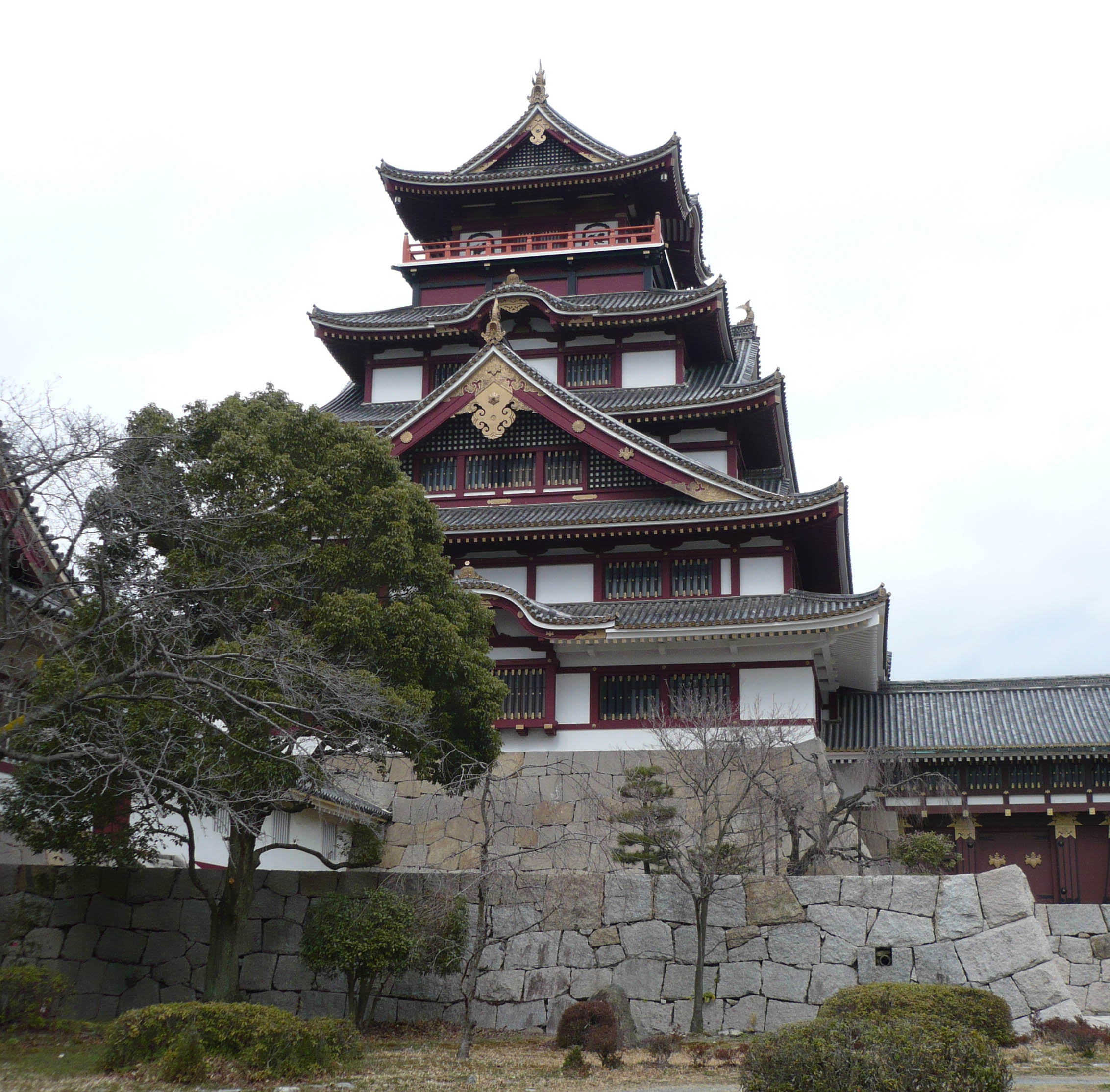 模擬天守側